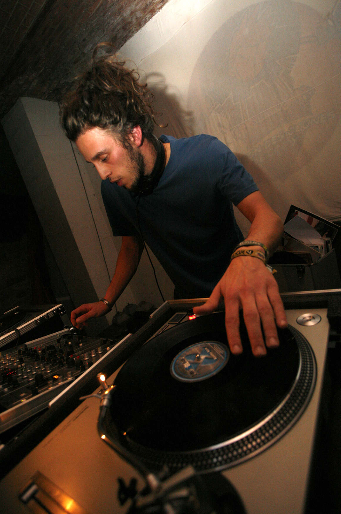 Alex Nilson